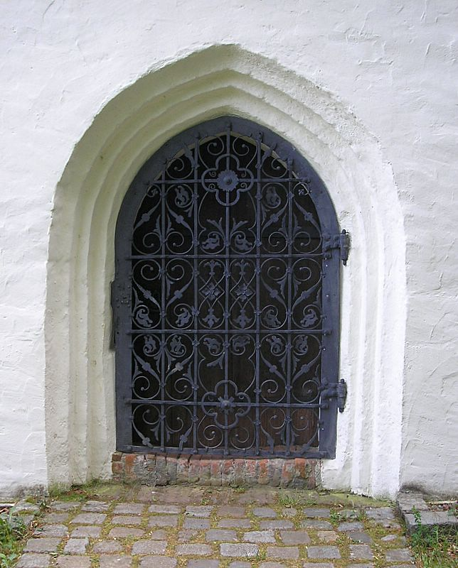 Burgstall Roggenstein (Gemeinde Emmering, Landkreis Fürstenfeldbruck, Oberbayern). Die gotische Kapelle (um 1400). Das Portal. Eigene Aufnahme, Mai 2007 / Roggenstein castle near Fuerstenfeldbruck (Upper Bavaria, Germany). The gothic chapel (ca. 1400). The door. Own photo, May 2007